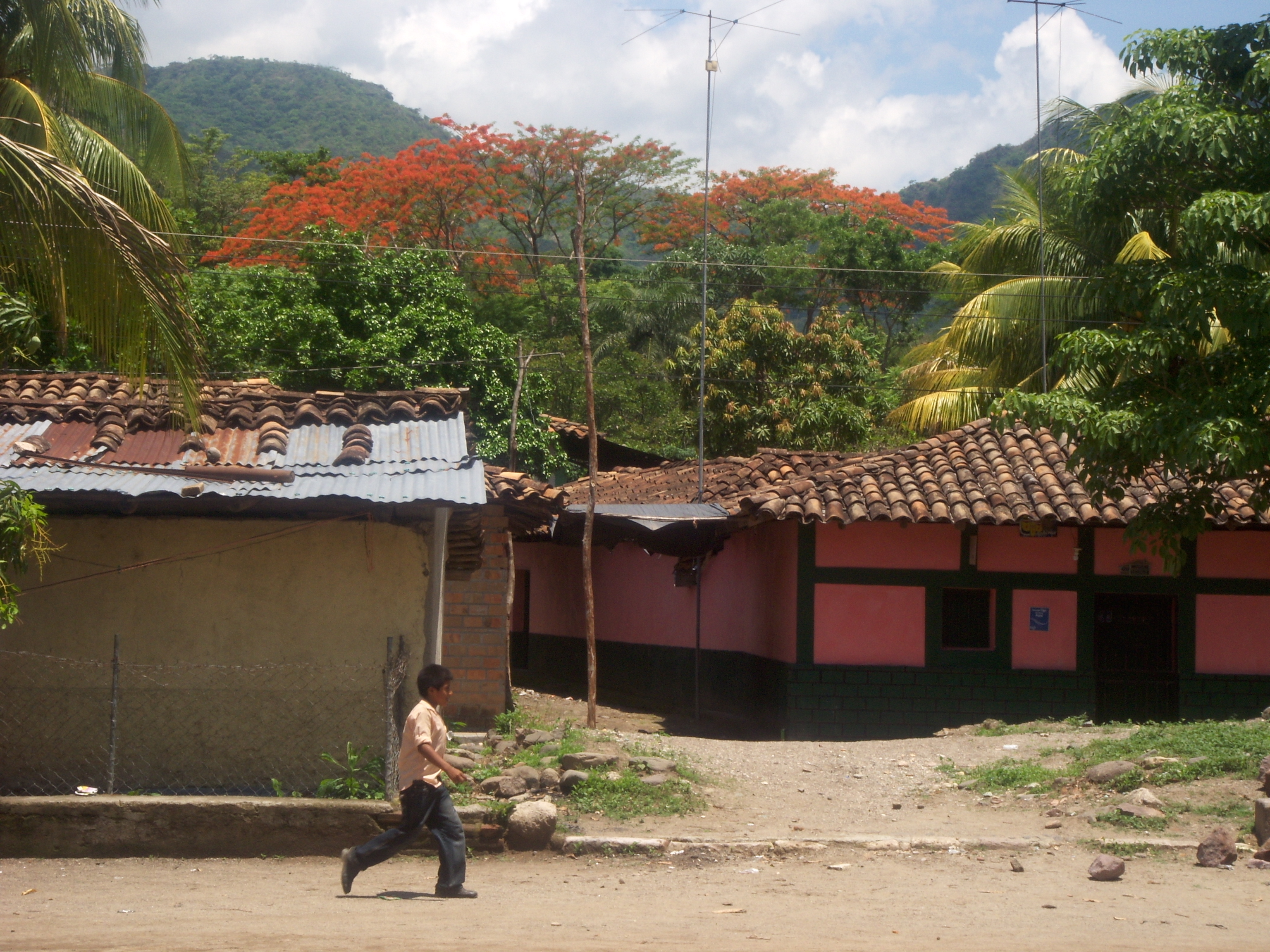 Casas tìpicas en el centro del municipio de Alubaren